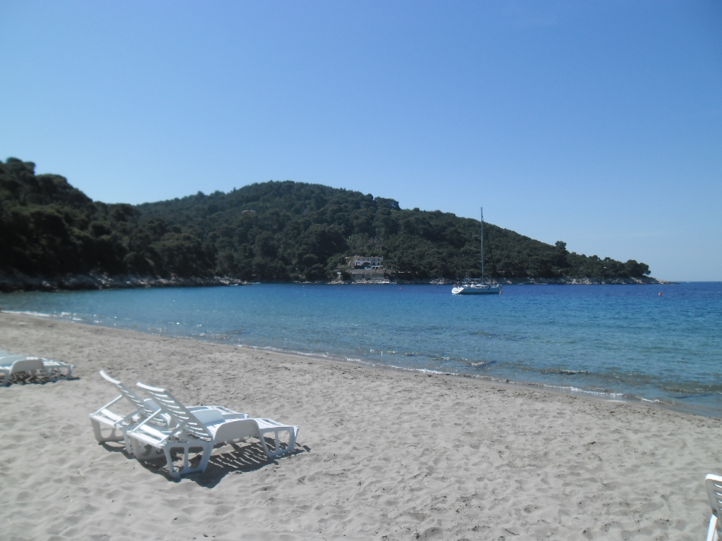 značajni krajobraz Saplunara, otok Mljet